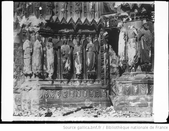 Statues de la cathédrale de Reims, après le bombardement,: [photographie de presse] / [Agence Rol]